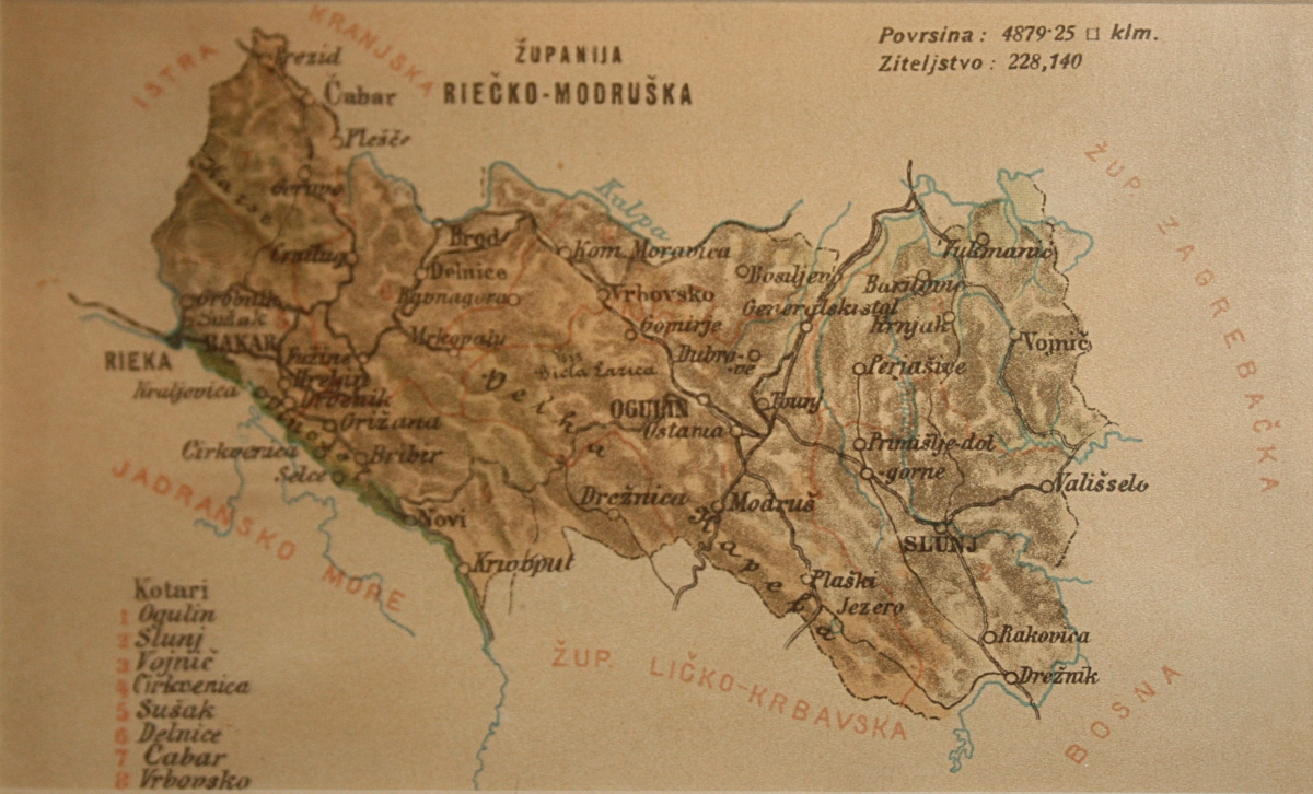 Zemljovidi županija na razglednicama oko 1900. godine, snimljeno tijekom Noći muzeja